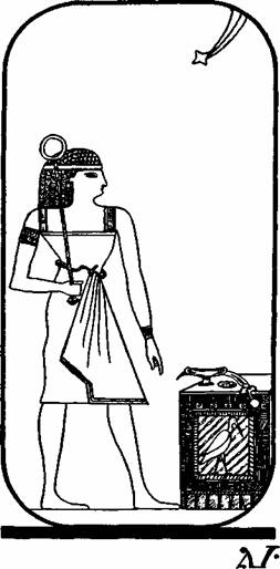 Старший Аркан I из Египетского Таро.